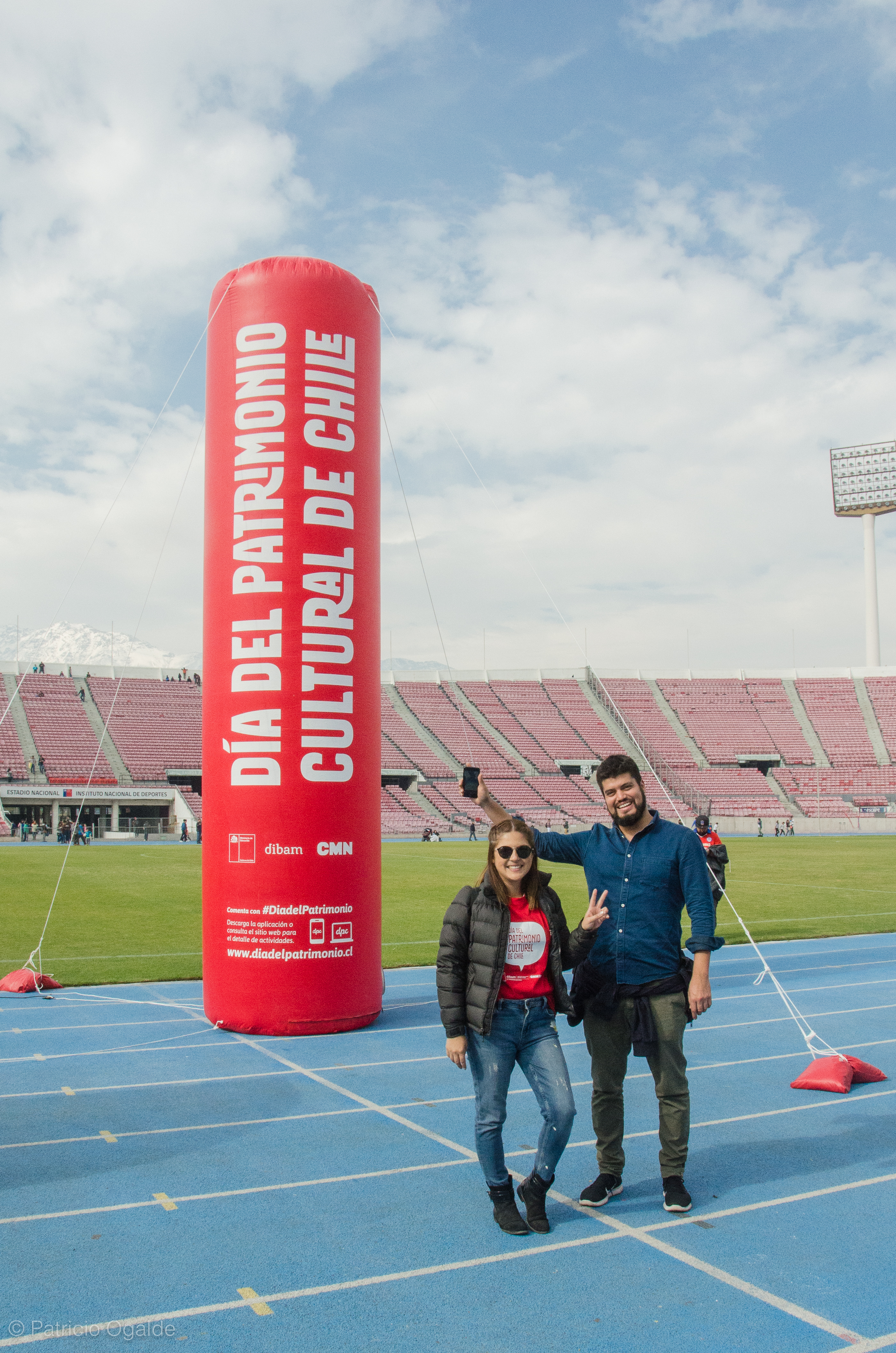 Personas de la organización